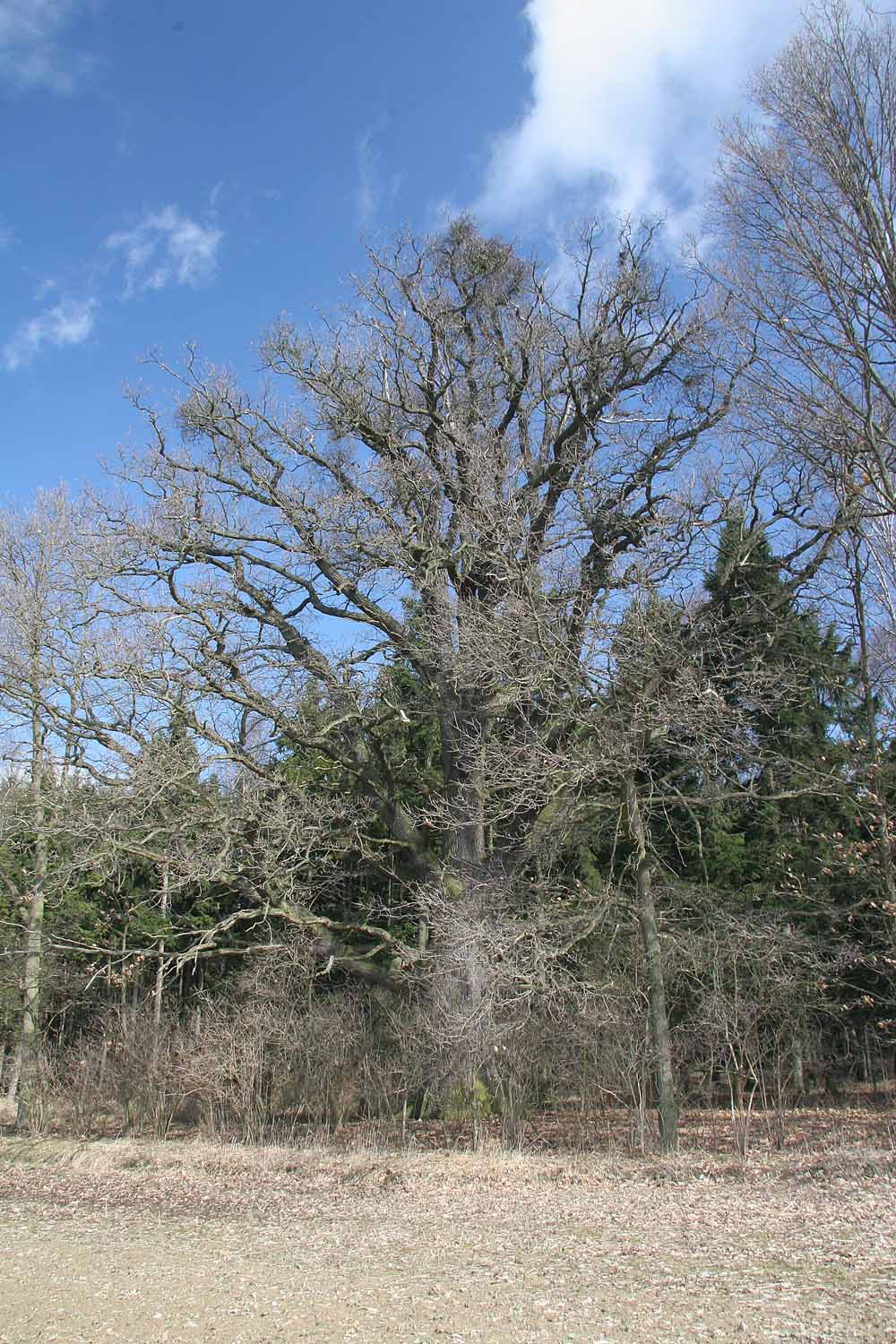 Dub u Kunčic